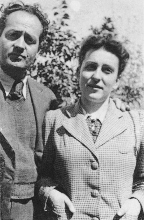 Γιώργος και Ελένη Ζογγολοπούλου (1937)